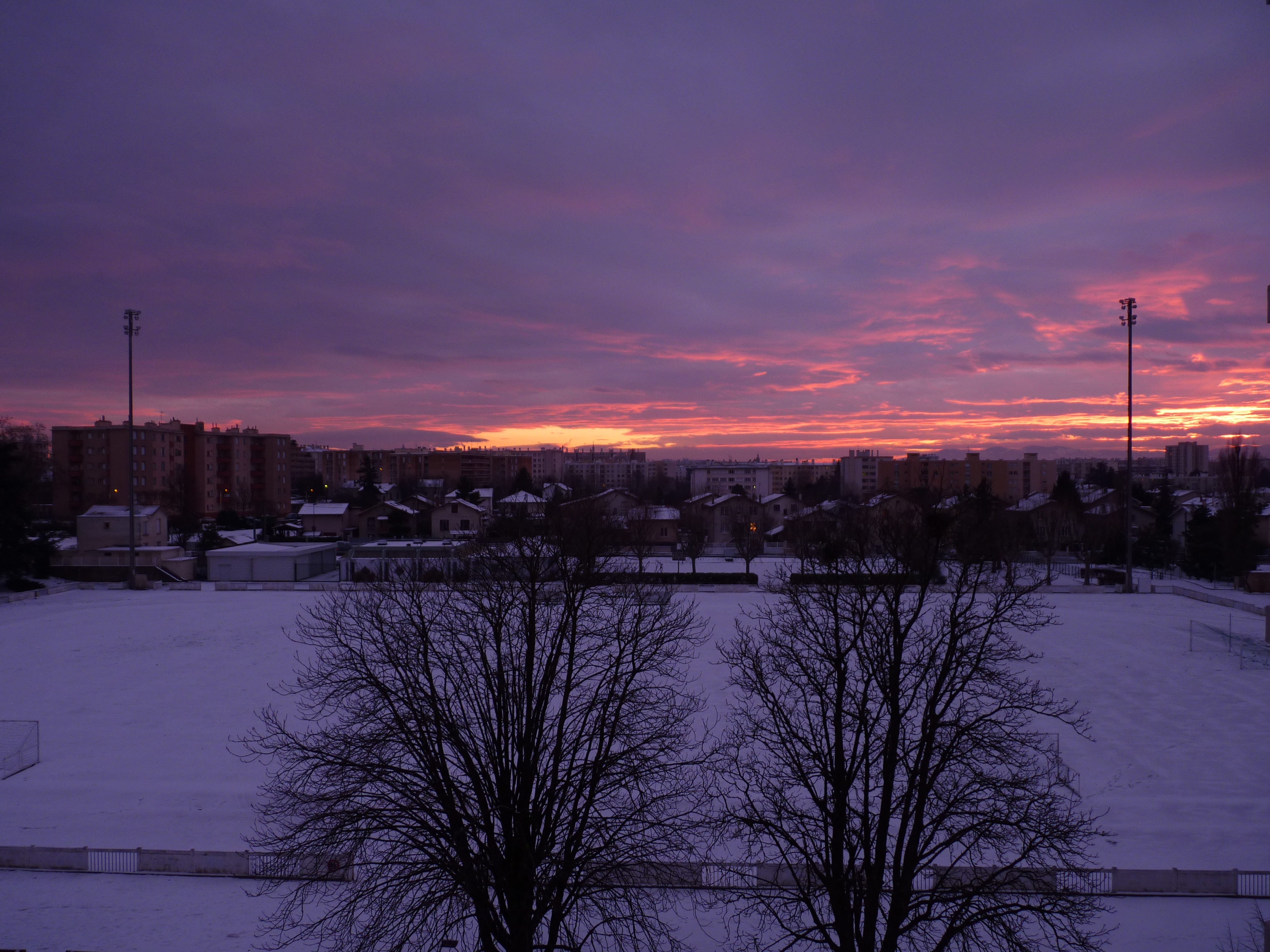 Caluire - Stade Pierre Bourdan un soir d'hiver